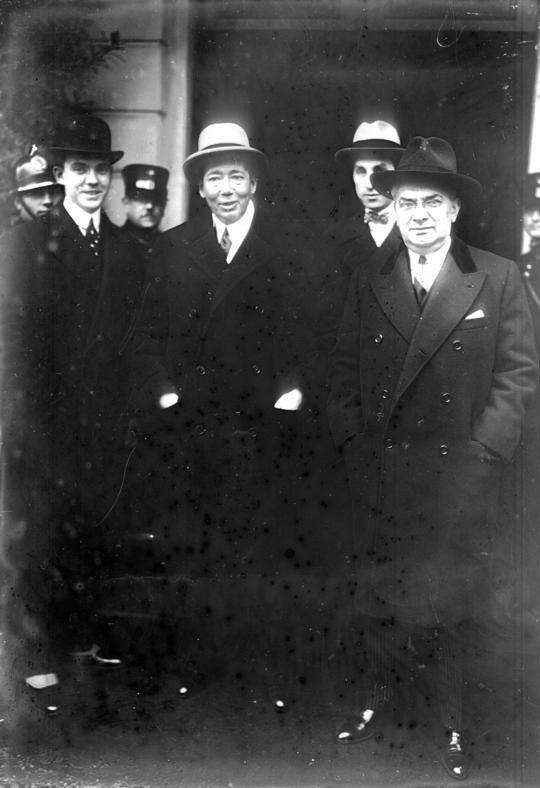 Erste Aufnahmen von der Völkerbundskonferenz in Lugano/Schweiz - unseres nach dort entsandten Sonder-Bild-Berichterstatters! Der rumänische Aussenminister Titulesco verläßt das Kurhaus nach der ersten Sitzung.